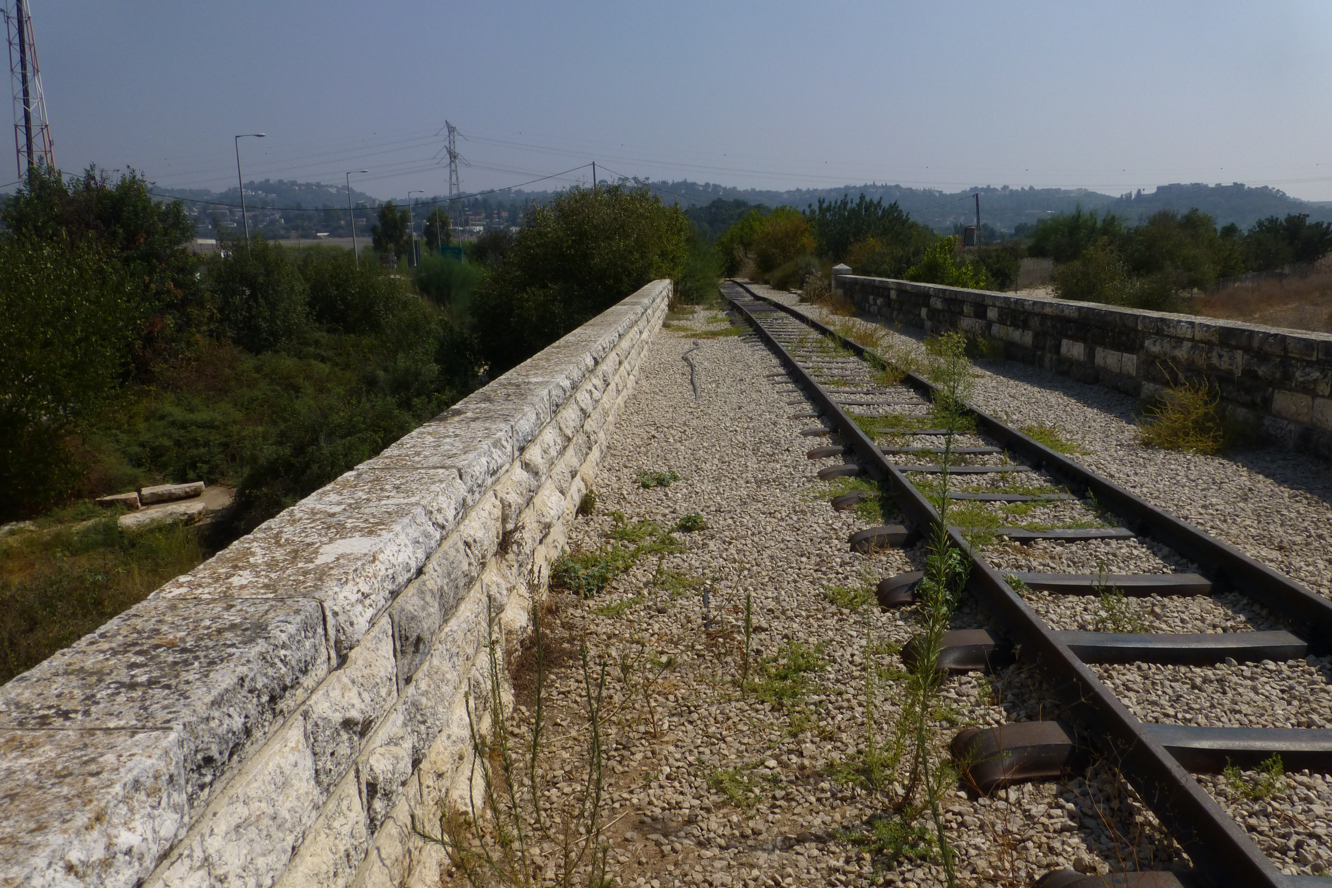 רכבת העמק - מעבירי מים והסוללה - צומת העמקים